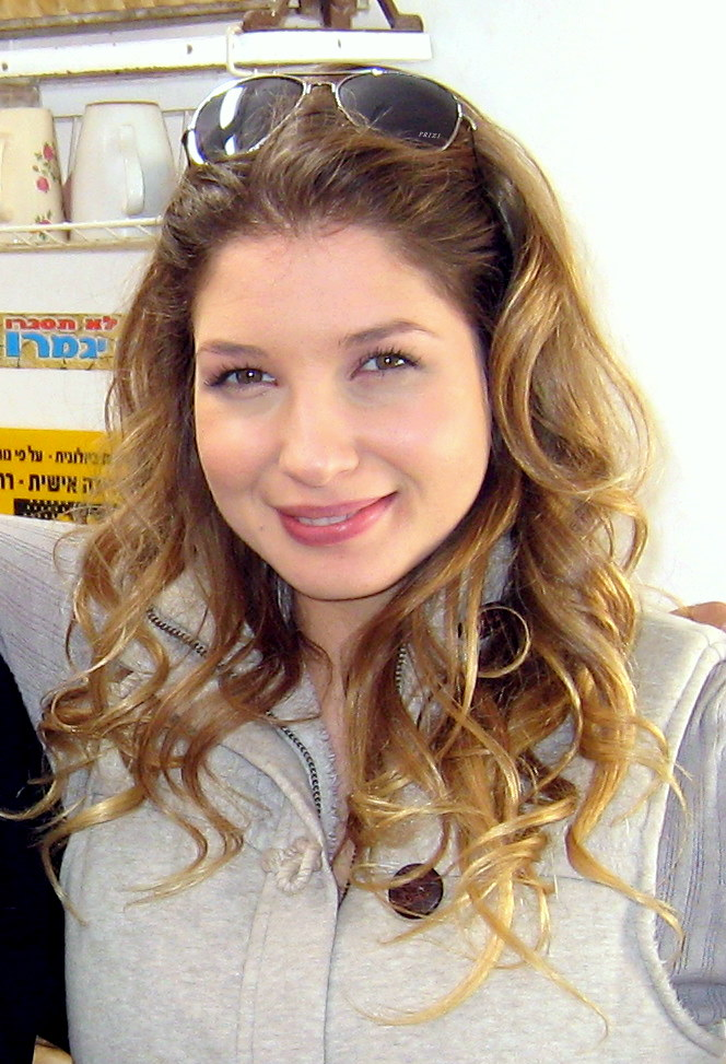 התמונה צולמה במסגרת אירוע חגיגות שמחת החלב בכפר הירוק בשנת 2008